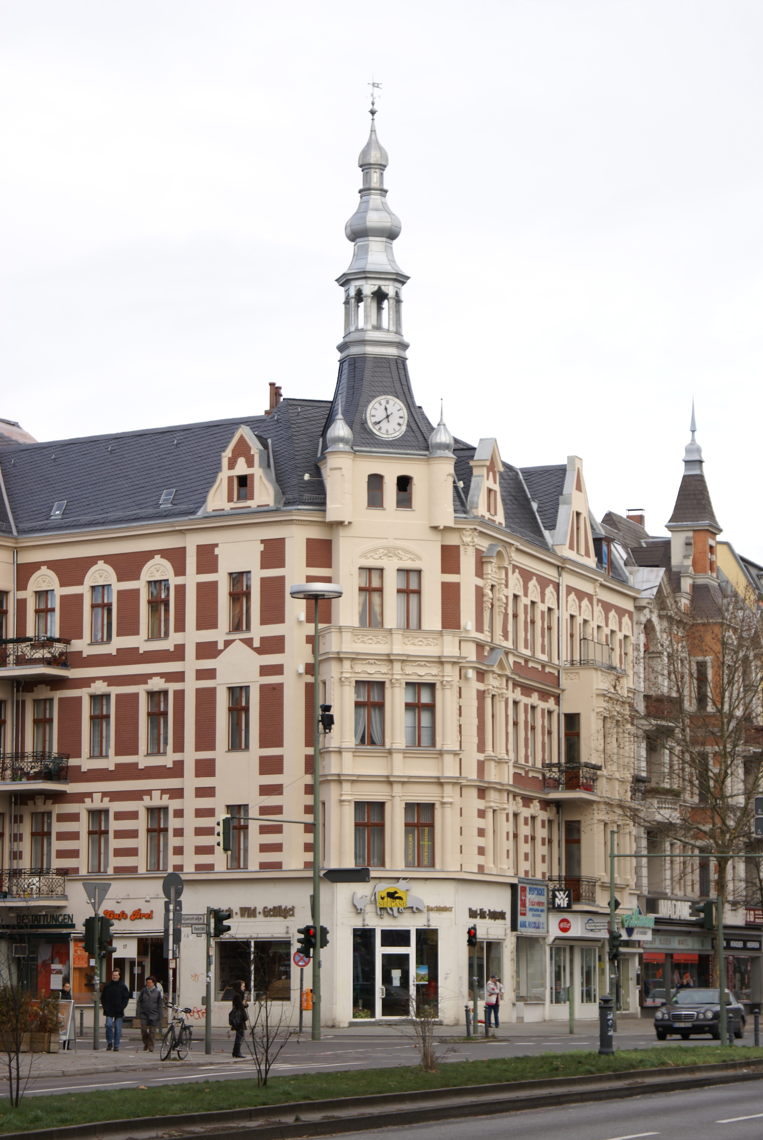 Eckhaus an der Kaisereiche Berlin Friedenau